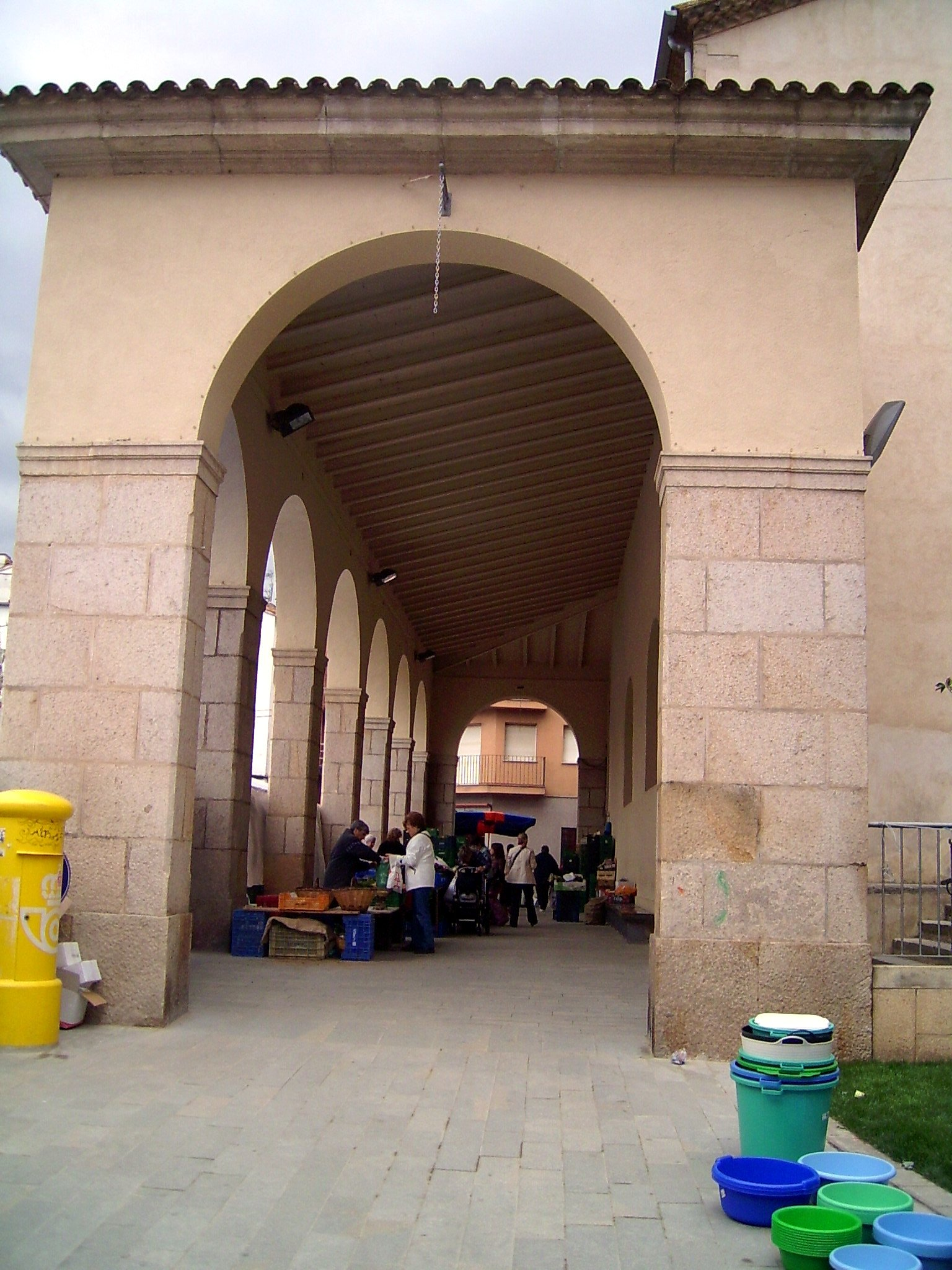 Pòrtic de l'esglèsia de Santa Coloma de Farners, a La Selva (Catalunya).